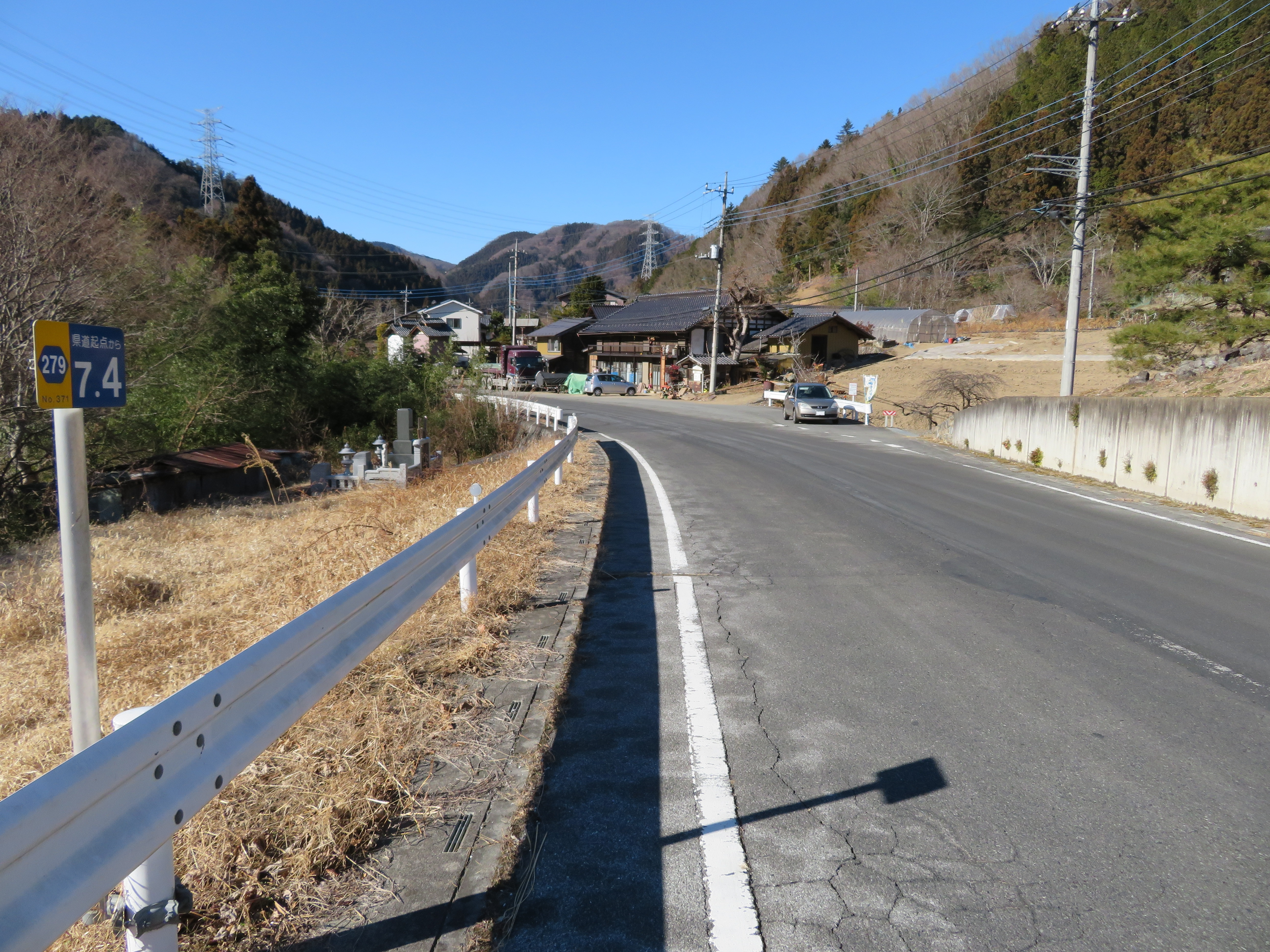 埼玉県道279号線小鹿野町両神薄付近